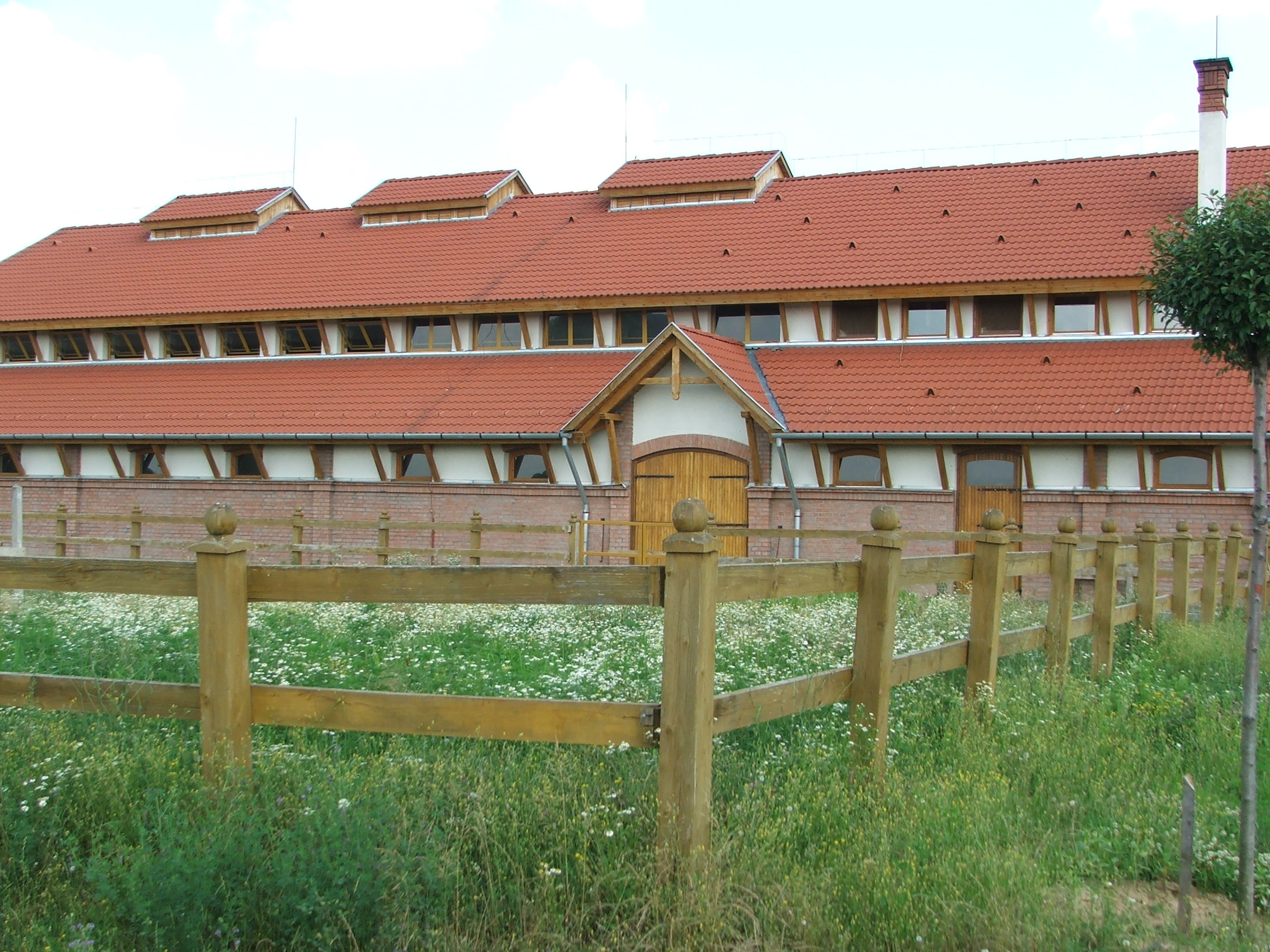 Somogyvámos, Krisna-völgy, templom, tehenészet